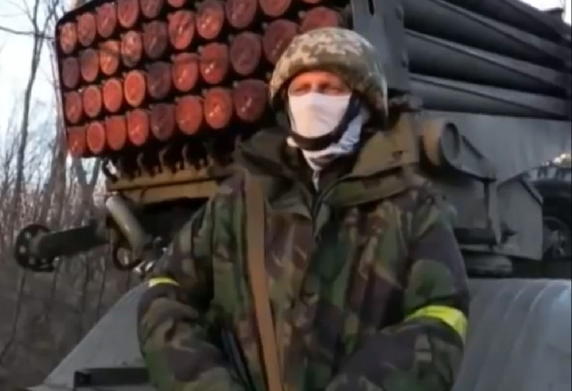 Командир бойової машини реактивної системи залпового вогню БМ-21 «Град» 28 омбр ЗСУ, iз зони АТО з-пiд Донецька в ефірі програми "Подробиці".